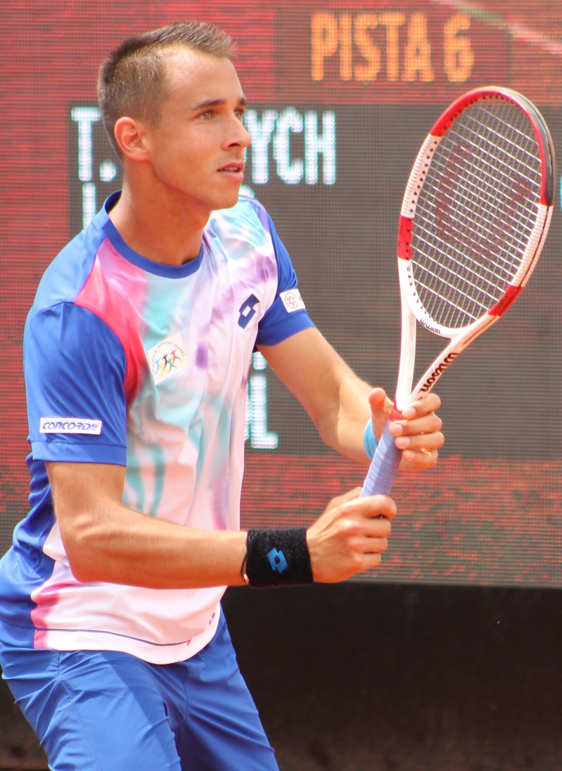 Rosol MA14 (1) - Copy